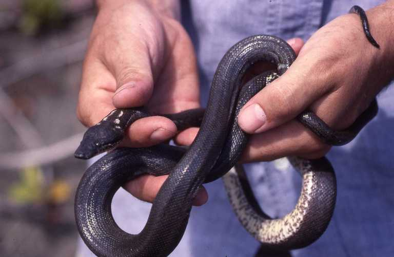 Casarea dussumieri; Round Island Boa (adult female).